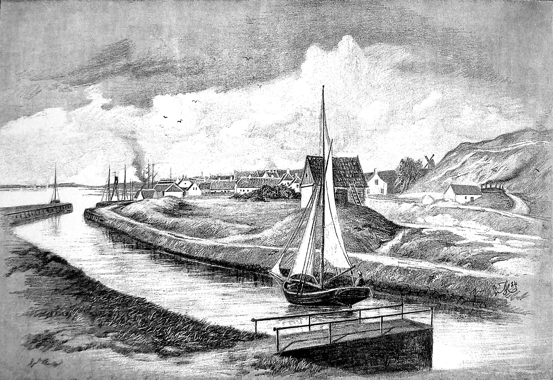 Frederik VII's Kanal eller Løgstør Kanal er en 4,4 km lang og ca. 3 meter dyb kanal der går fra Løgstør mod syd til Lendrup Strand ved Limfjorden.